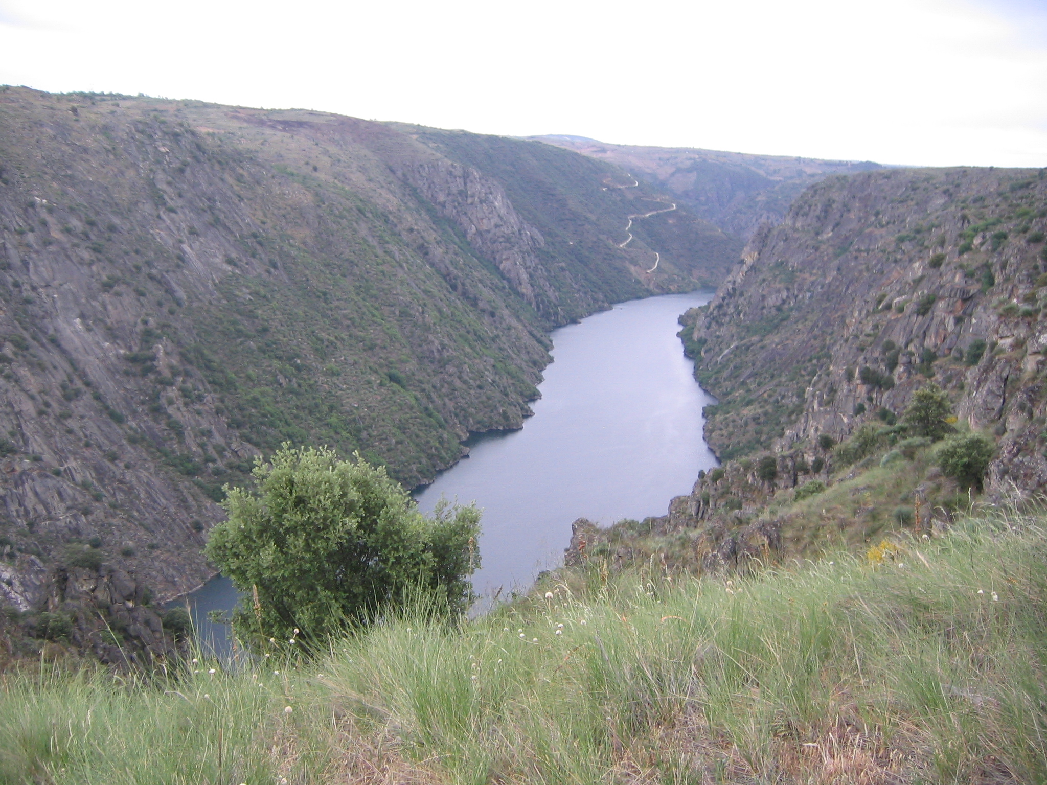 Vista parcial de los Arribes del Duero desde la ribera española.